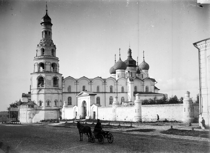 Вид на кафедральный собор. Казань.